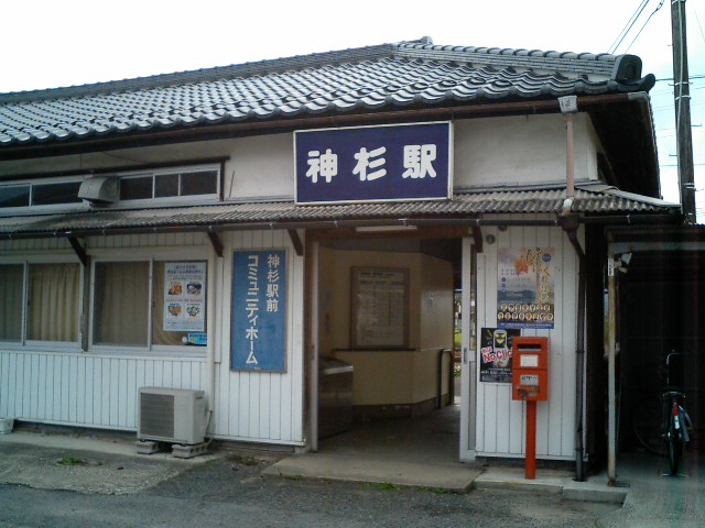 Kamisugi Station building